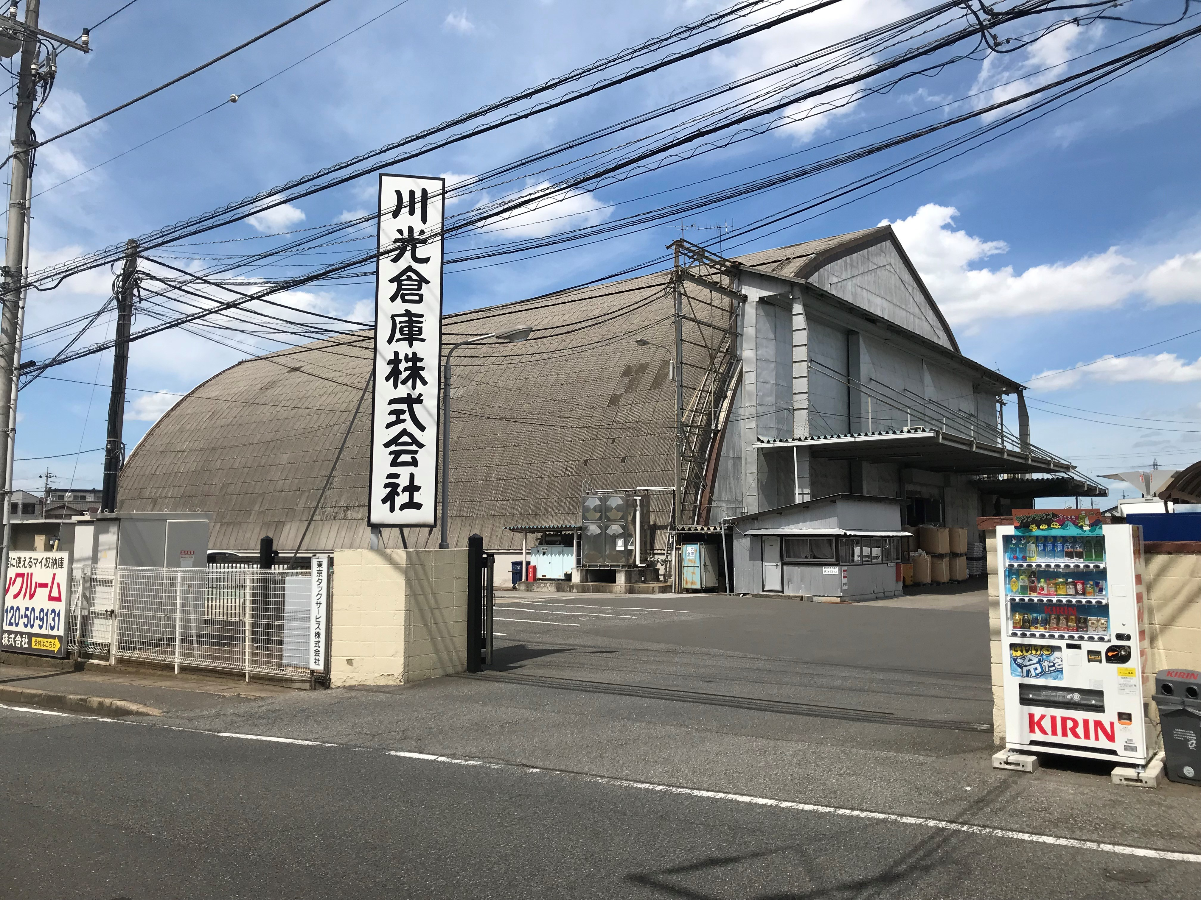 民間の倉庫として使用されている旧気球連隊格納庫（2018年）